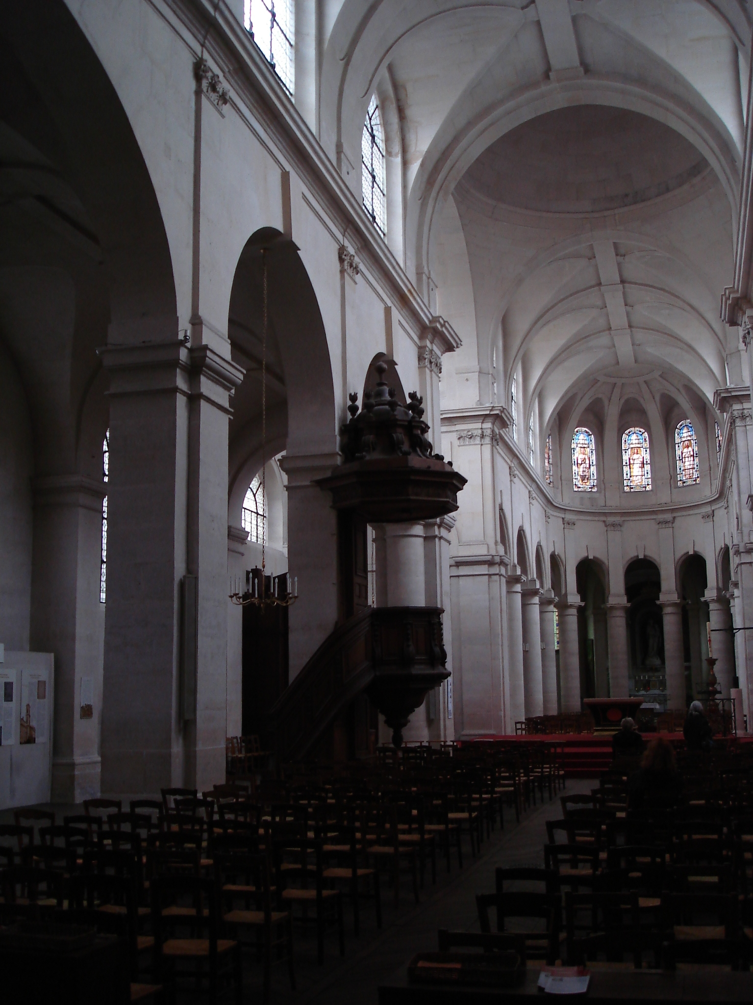 Church:Saint-Jacques-du-Haut-Pas (rue saint-Jacques - Paris Ve arrondissement). Inside of the church